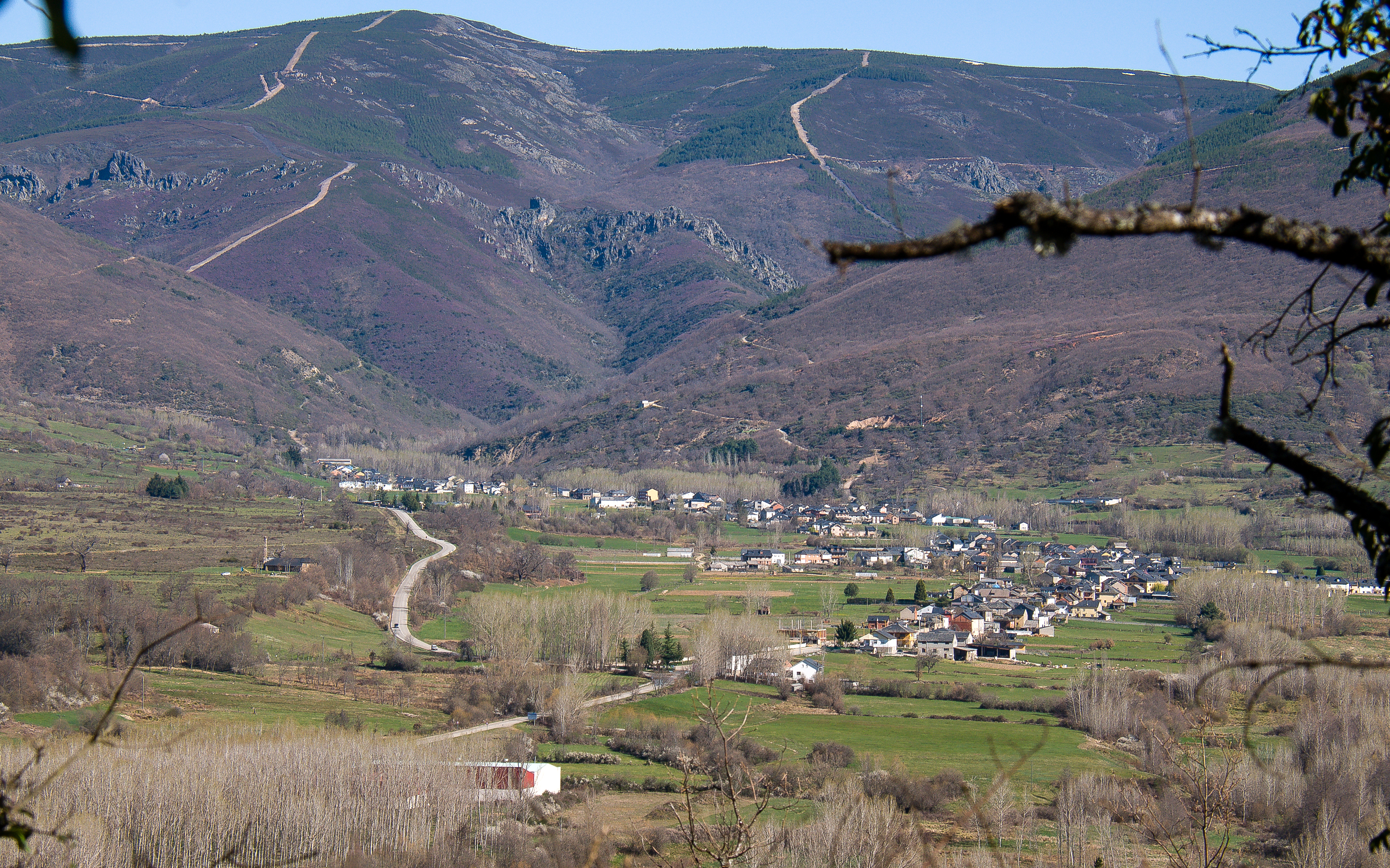 Pueblo del Bierzo Alto, en el valle llamado la Suiza del Bierzo